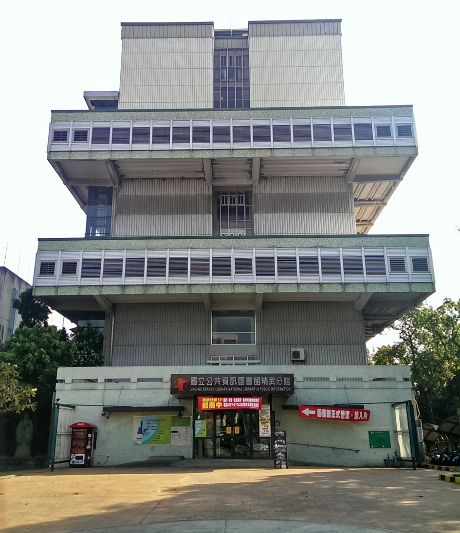 中文（台灣）: 國立公共資訊圖書館精武分館。